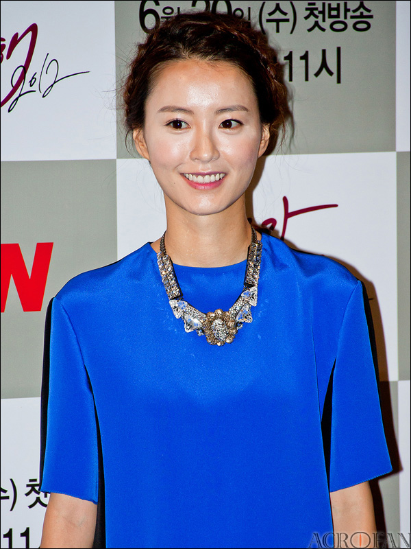 tvN 드라마 로맨스가 필요해 2012의 제작 발표회에 참석한 정유미